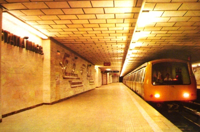 Metrou în stația IMGB (actualmente Dimitrie Leonida)